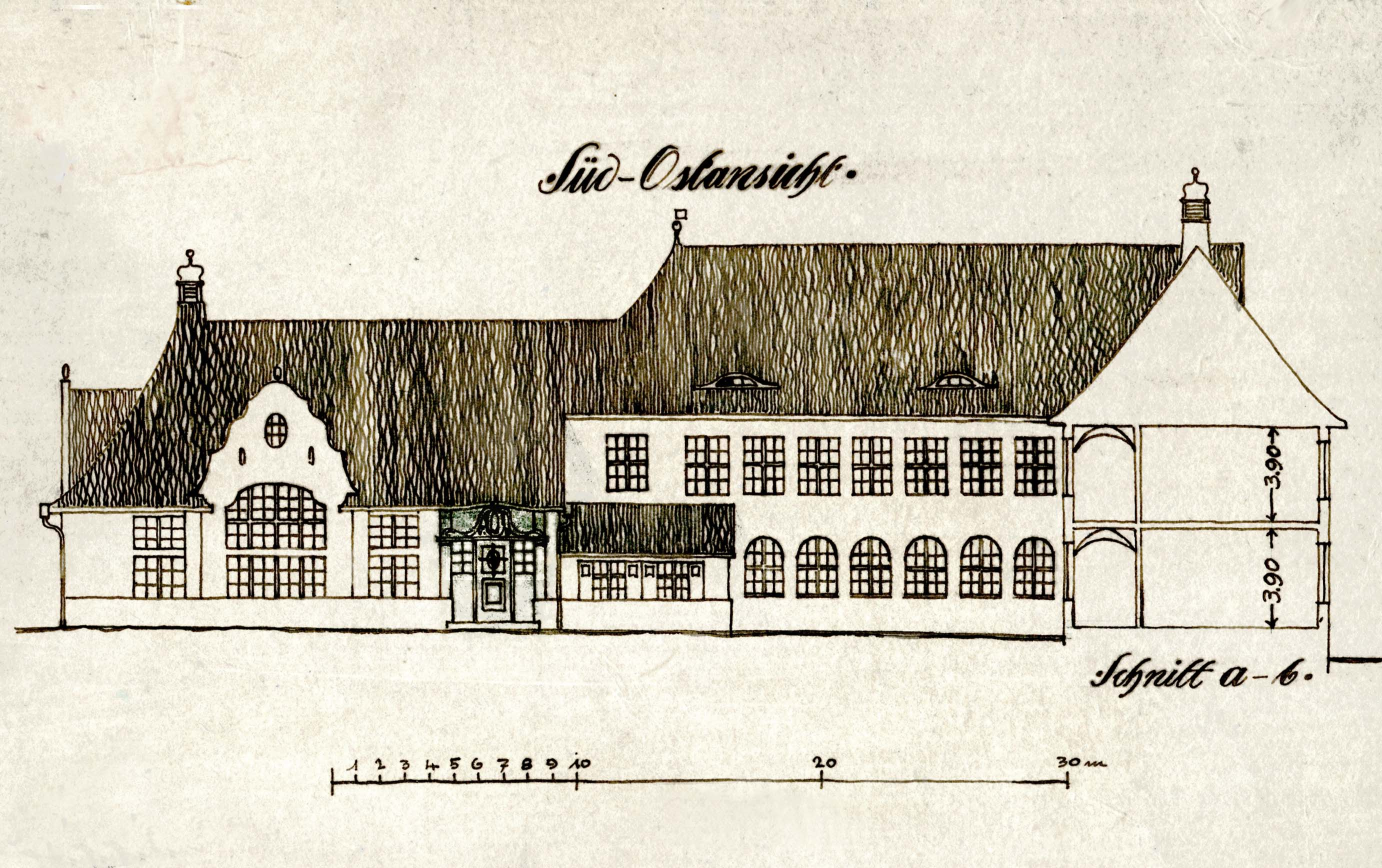 Entwurf aus dem Jahr 1911 für ein Schulgebäude in Arnsdorf bei Dresden im Stil der Reformarchitektur